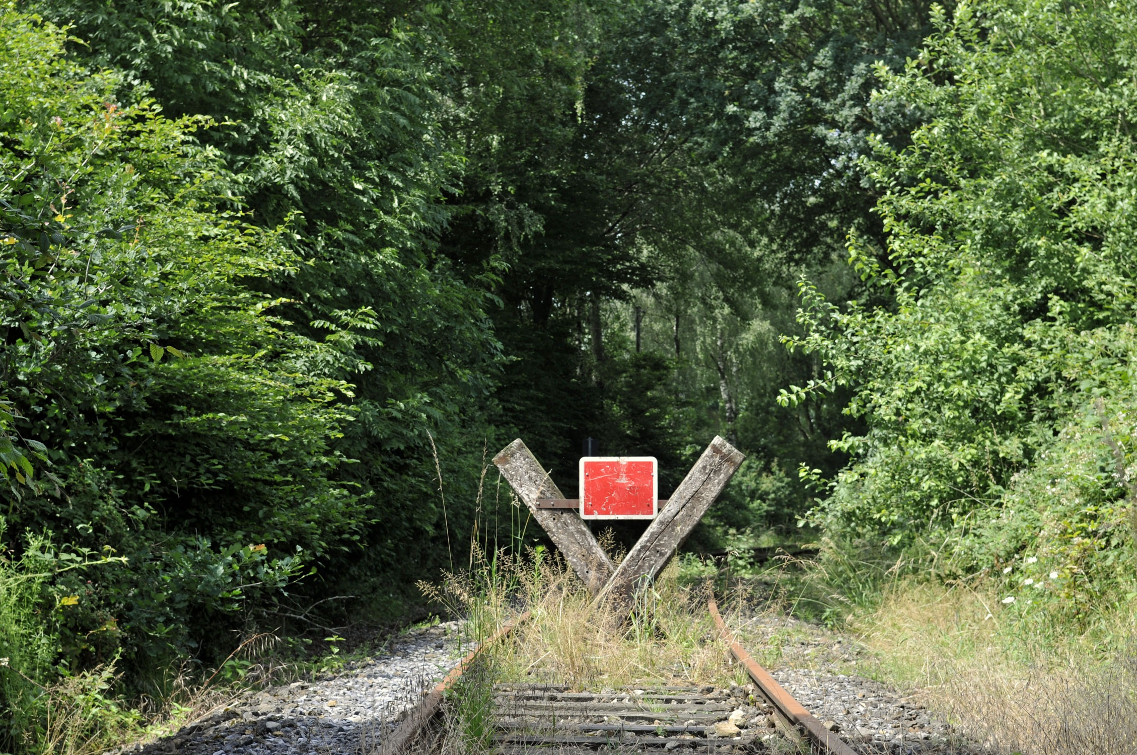 TWE-Strecke bei Tecklenburg, seit Sperrung der Teutoburger Wald-Eisenbahn im September 2010 ergreift die Natur Besitz von den unbefahrenen Gleisen